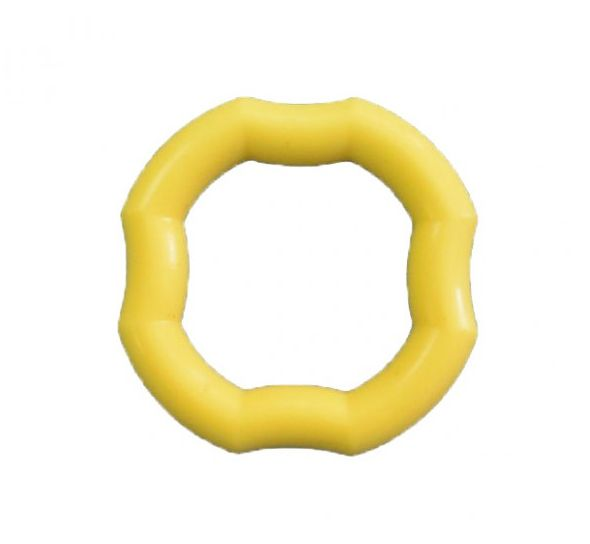 Акушерский пессарий Шнейдермана – кольцевой пессарий, изготовленный из биологически инертного медицинского силикона, лишенного аллергенных и токсических свойств. Изделие выпускается в двух размерах: для рожавших и нерожавших женщин.